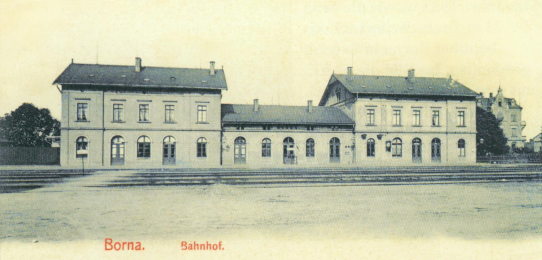 Bahnhof Borna an der Bahnstrecke Kieritzsch–Chemnitz